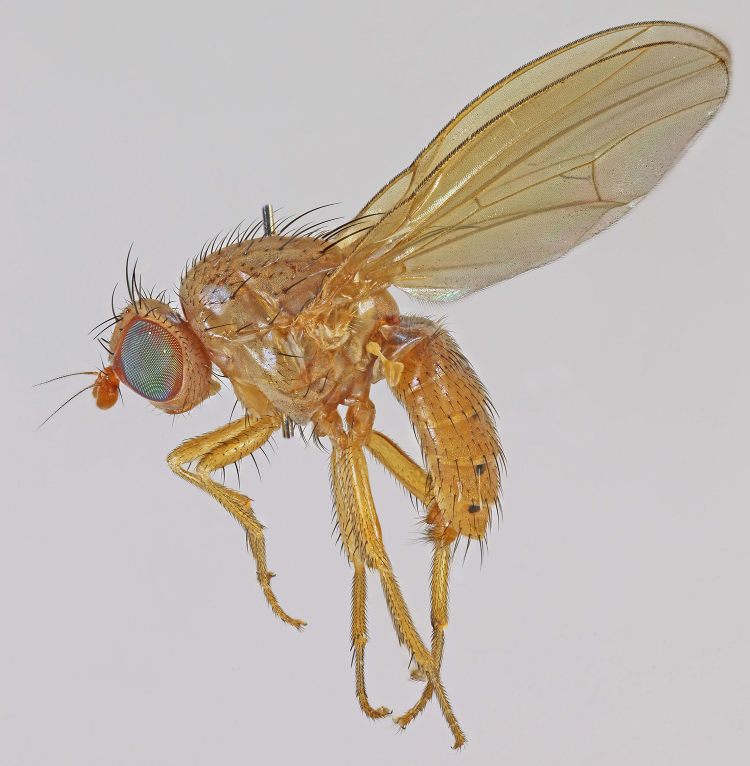 Sapromyza quadripunctata (Linnaeus, 1767), Deeside, North Wales, June 2015 Long 3.5 mm.